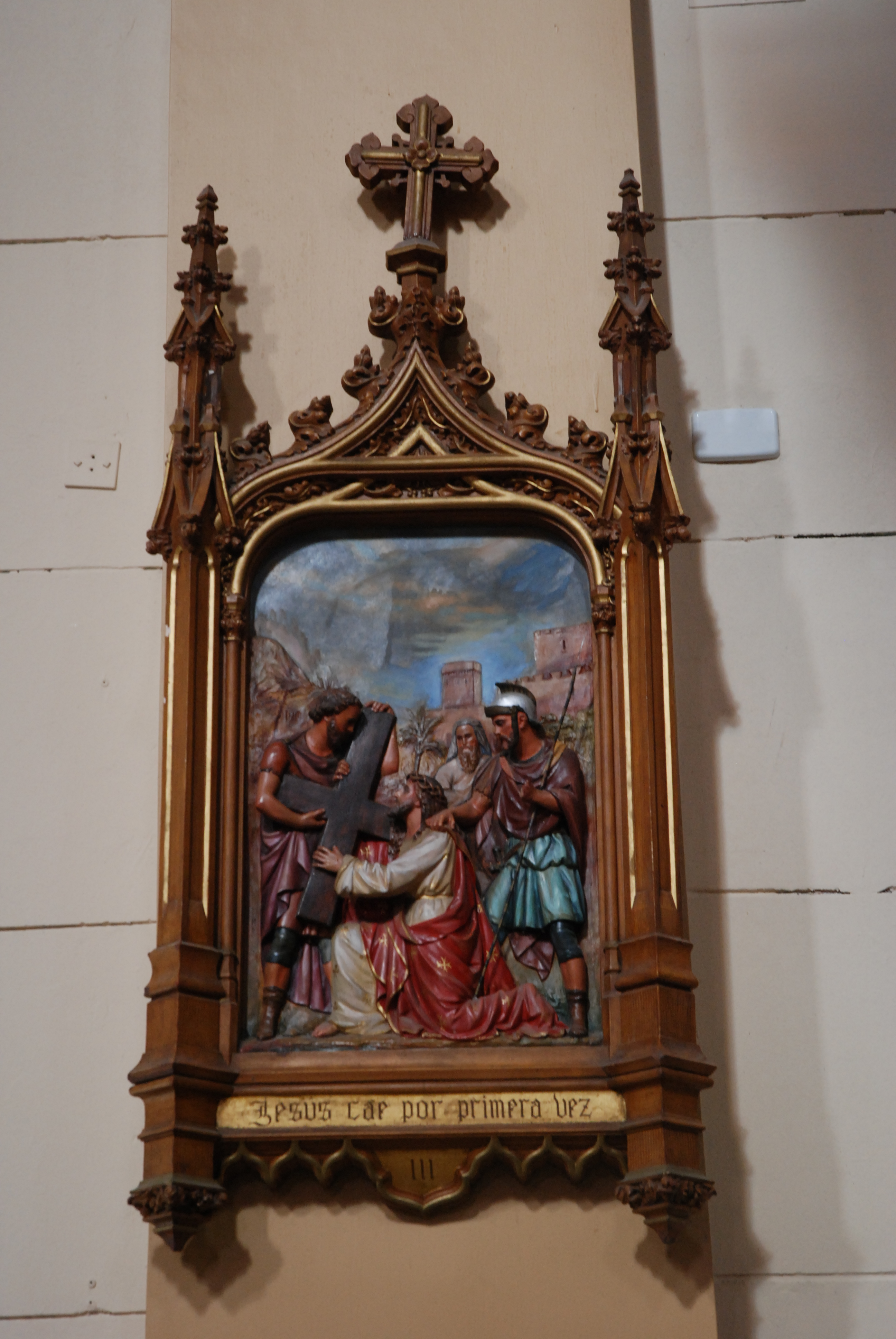 Una de las escenas del viacrucis francés de 1820, en la Iglesia Matriz San Ignacio de Loyola. Junín, Argentina.